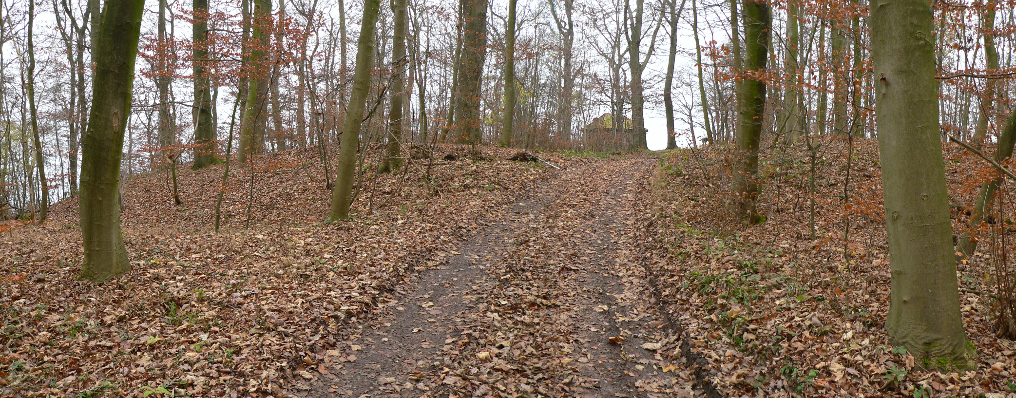 Weg zur Obensburg durch den Wall